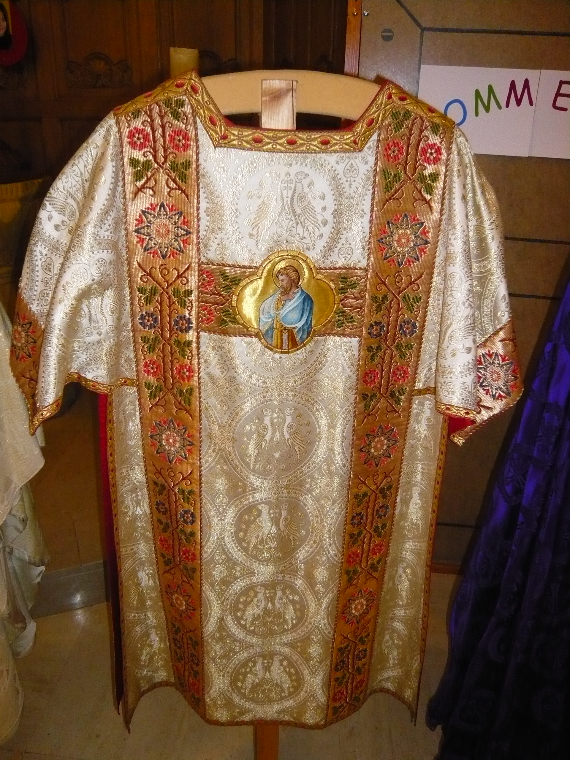 Eng Dalmatik, liturgescht Kleedungsstéck vum Diakon